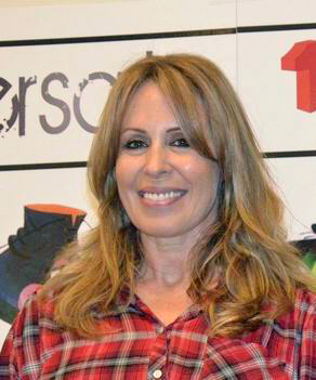 Míriam Díaz-Aroca en el 40 Aniversario Un Dos Tres